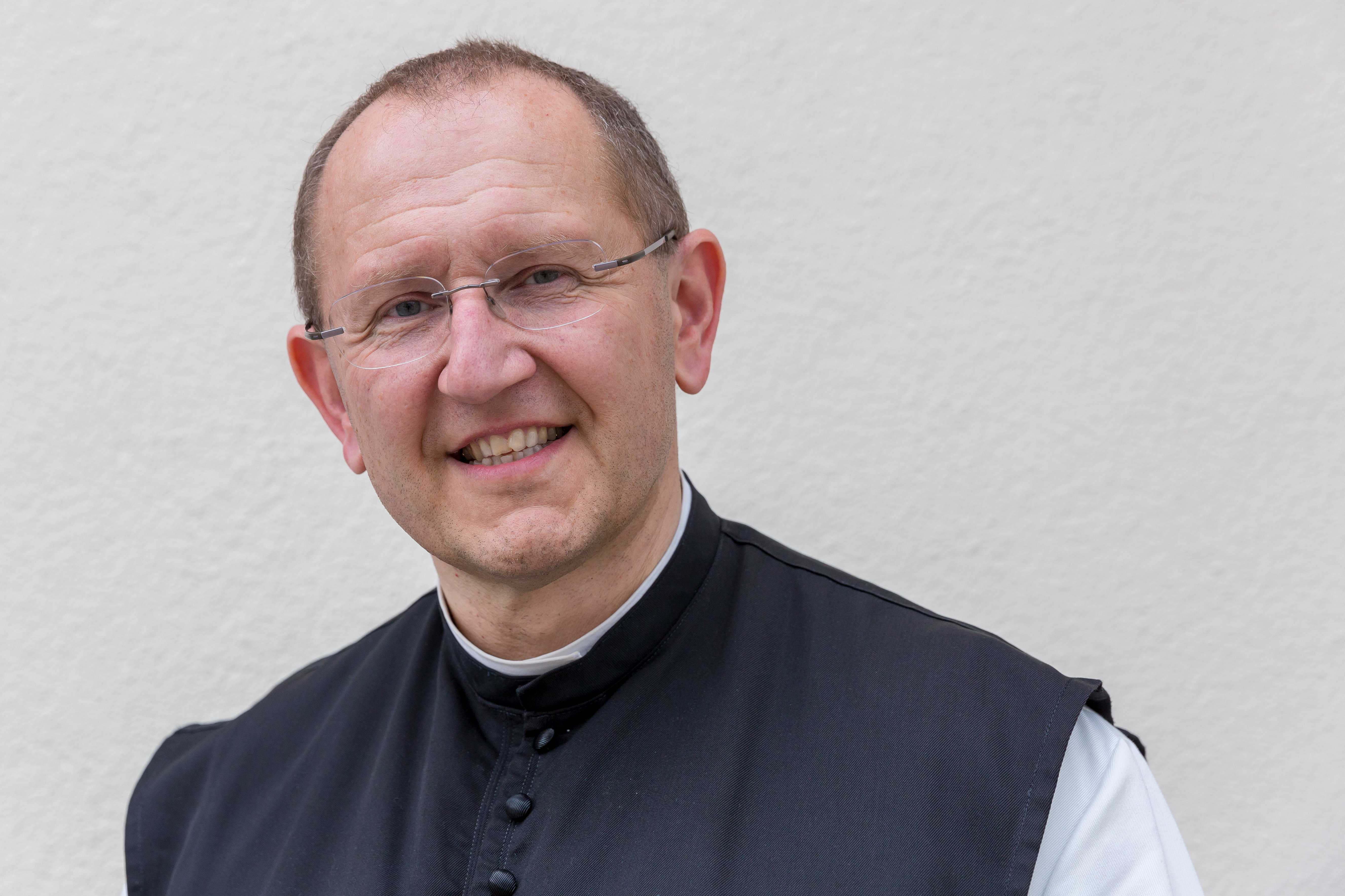 P. Karl Josef Wallner (*1963) ist ein österreichischer Zisterziensermönch. Siehe Wiki-Artikel.